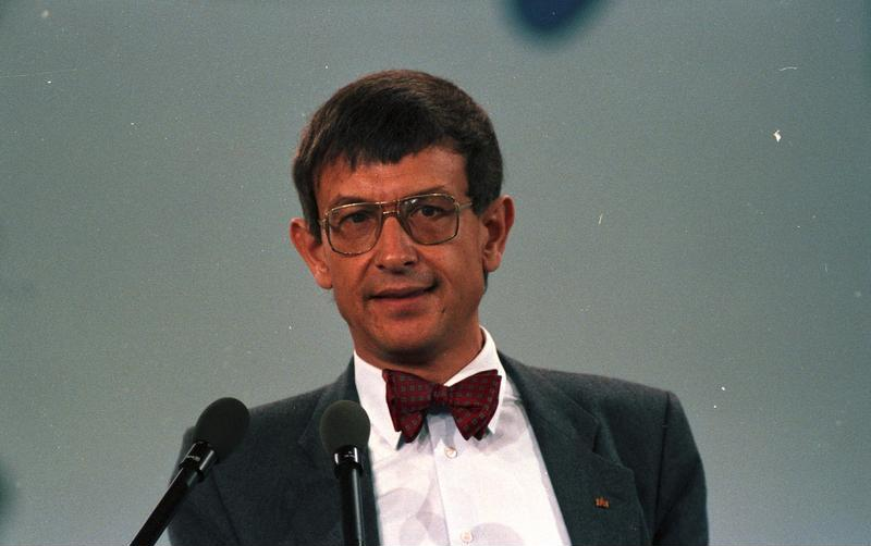 7./8.10.1986 34. Bundesparteitag der CDU in der Rheingoldhalle, Mainz (6.-8.10.1986).